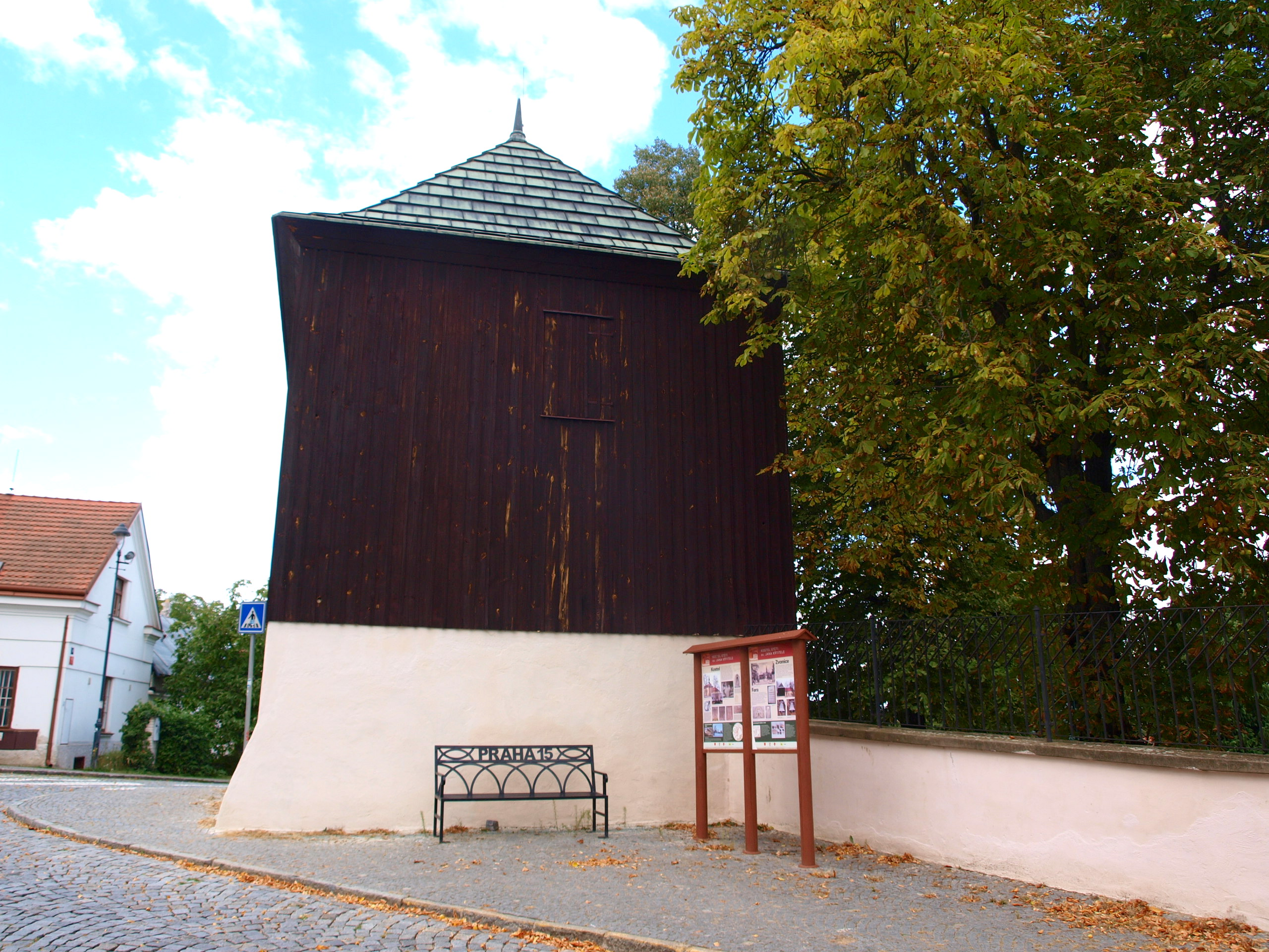 kostel Stětí sv. Jana v Hostivaři